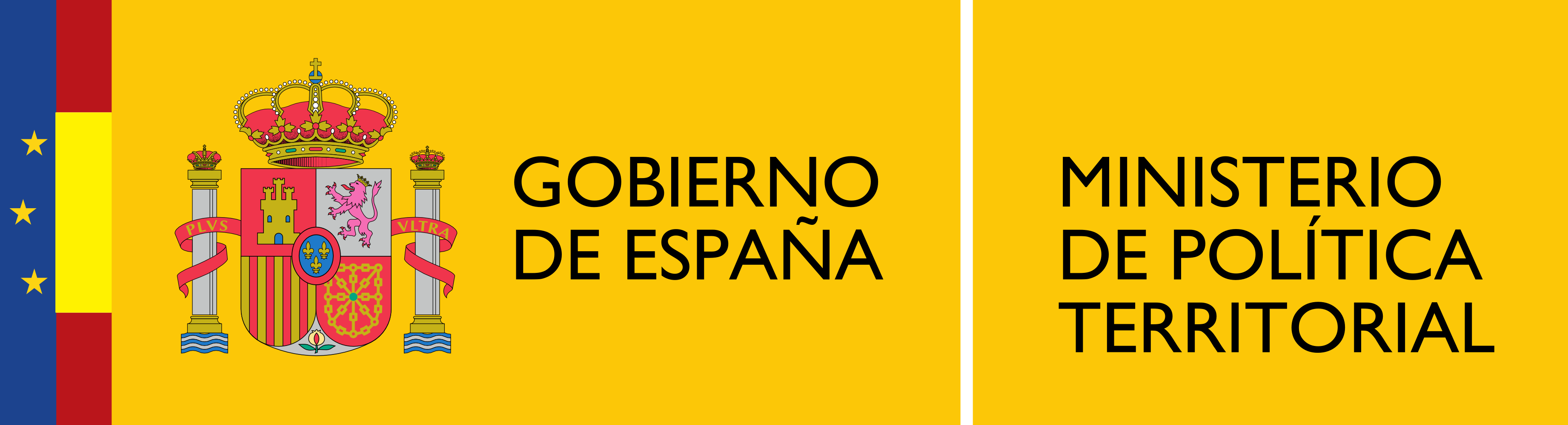 Logotipo del Ministerio de Política Territorial